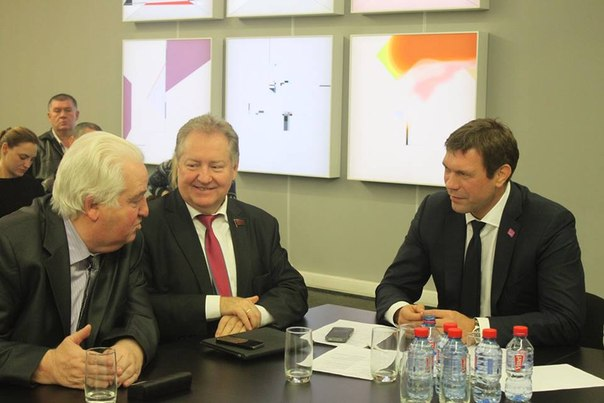 О.А.Царев с депутатами Государственной Думы на заседании Союза беженцев Украины